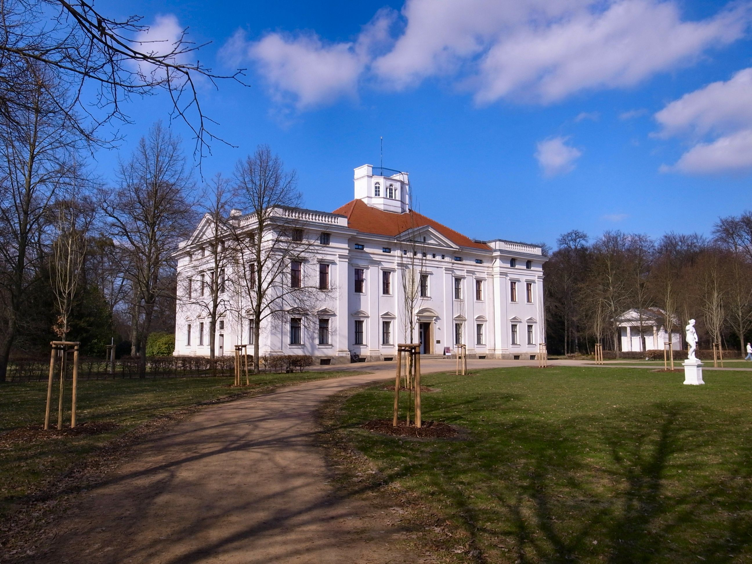 Dessau, Schloss Georgium und Blumengartenhaus (im Hintergrund)